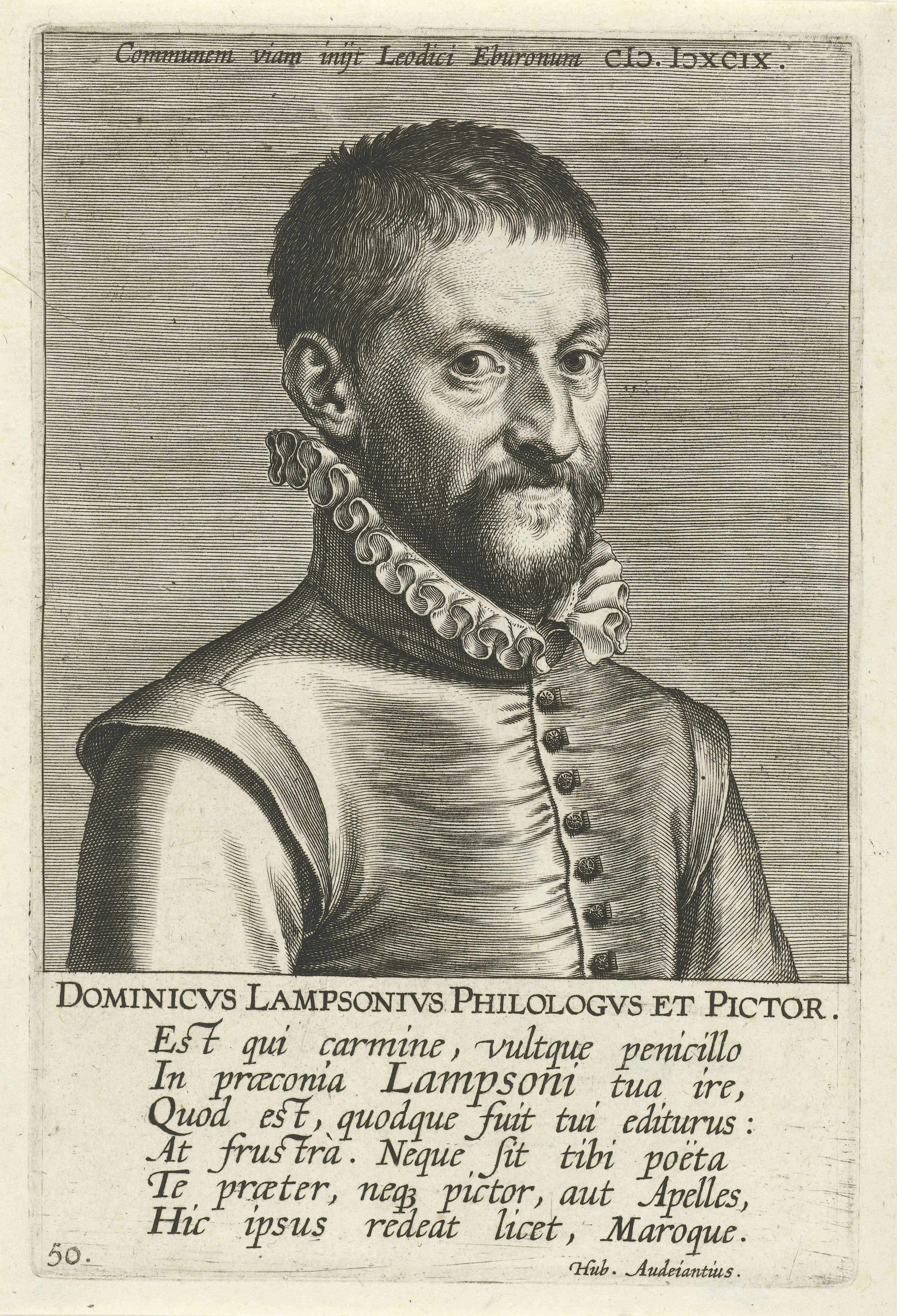 IdentificatieTitel(s): Portret van Dominique LampsoniusDominicvs Lampsonivs Philologvs et Pictor (titel op object)Portretten van beroemde Nederlandse en Vlaamse geleerden (serietitel)Illustrium Galliae Belgicae scriptorum icones et elogi (serietitel)Objecttype: prent Serienummer: 50/51Objectnummer: RP-P-OB-6905Catalogusreferentie: New Hollstein Dutch fig. 29-1(2)Opschriften / Merken: verzamelaarsmerk, verso midden onder, gestempeld: Lugt 2228Omschrijving: Portret van Dominique Lampsonius, bekende schilder en schrijver. Buste naar rechts. De prent heeft een Latijns boven- en onderschrift en maakt deel uit van een serie van beroemde Nederlandse en Vlaamse geleerden.VervaardigingVervaardiger: prentmaker: Philips Galle (toegeschreven aan atelier van)schrijver: Hub. Audeiantius (vermeld op object)uitgever: Philips Galle (mogelijk)uitgever: Theodoor Galle (mogelijk)Plaats vervaardiging: AntwerpenDatering: 1604 - 1608Fysieke kenmerken: gravureMateriaal: papier Techniek: graveren (drukprocedé)Afmetingen: plaatrand: b 105 mm × h 160 mmOnderwerpWie: Dominicus LampsoniusVerwerving en rechtenVerwerving: onbekendCopyright: Publiek domein